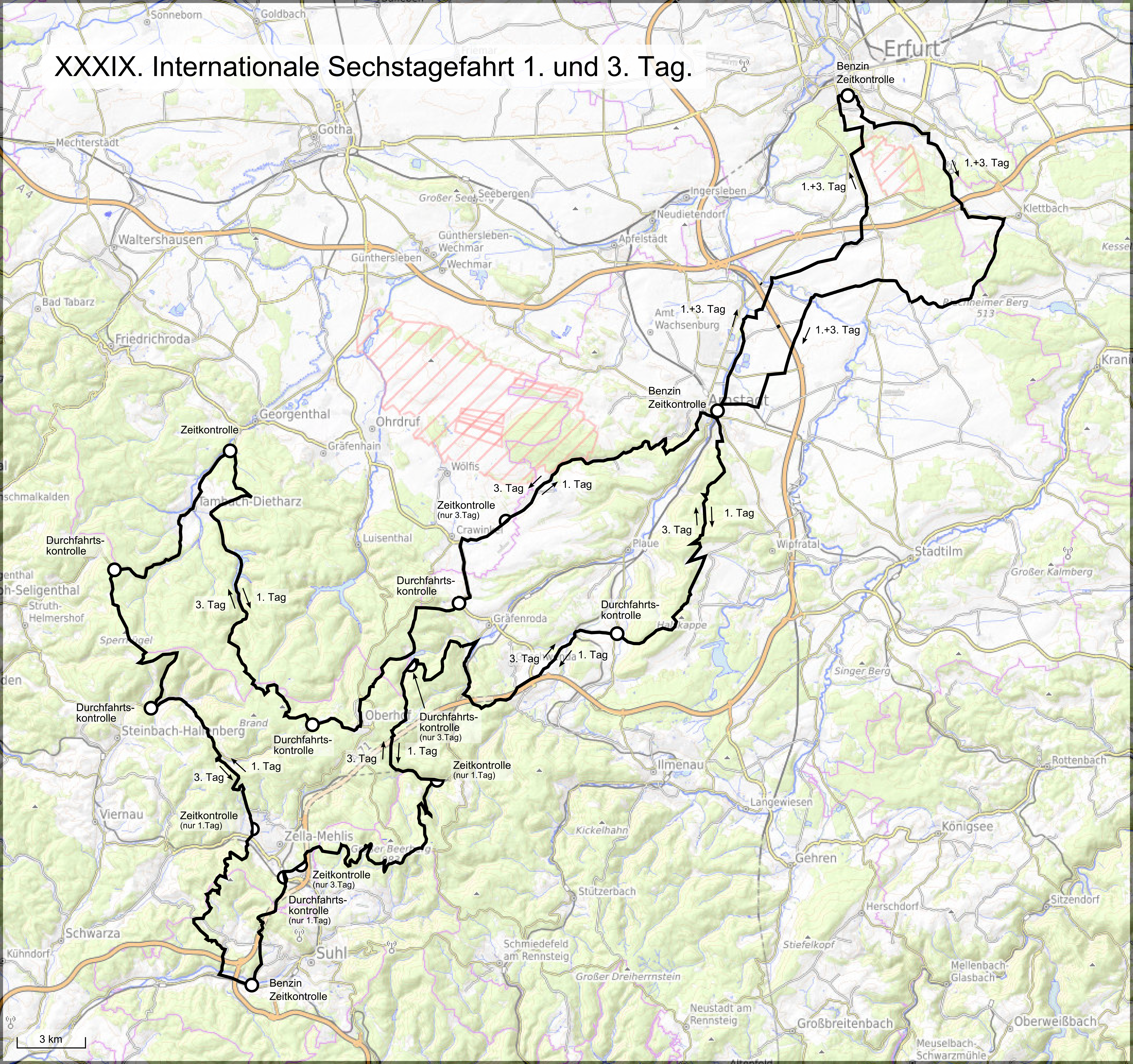 Karte der 39. Internationale Sechstagefahrt, Route des 1. und 3. Tages